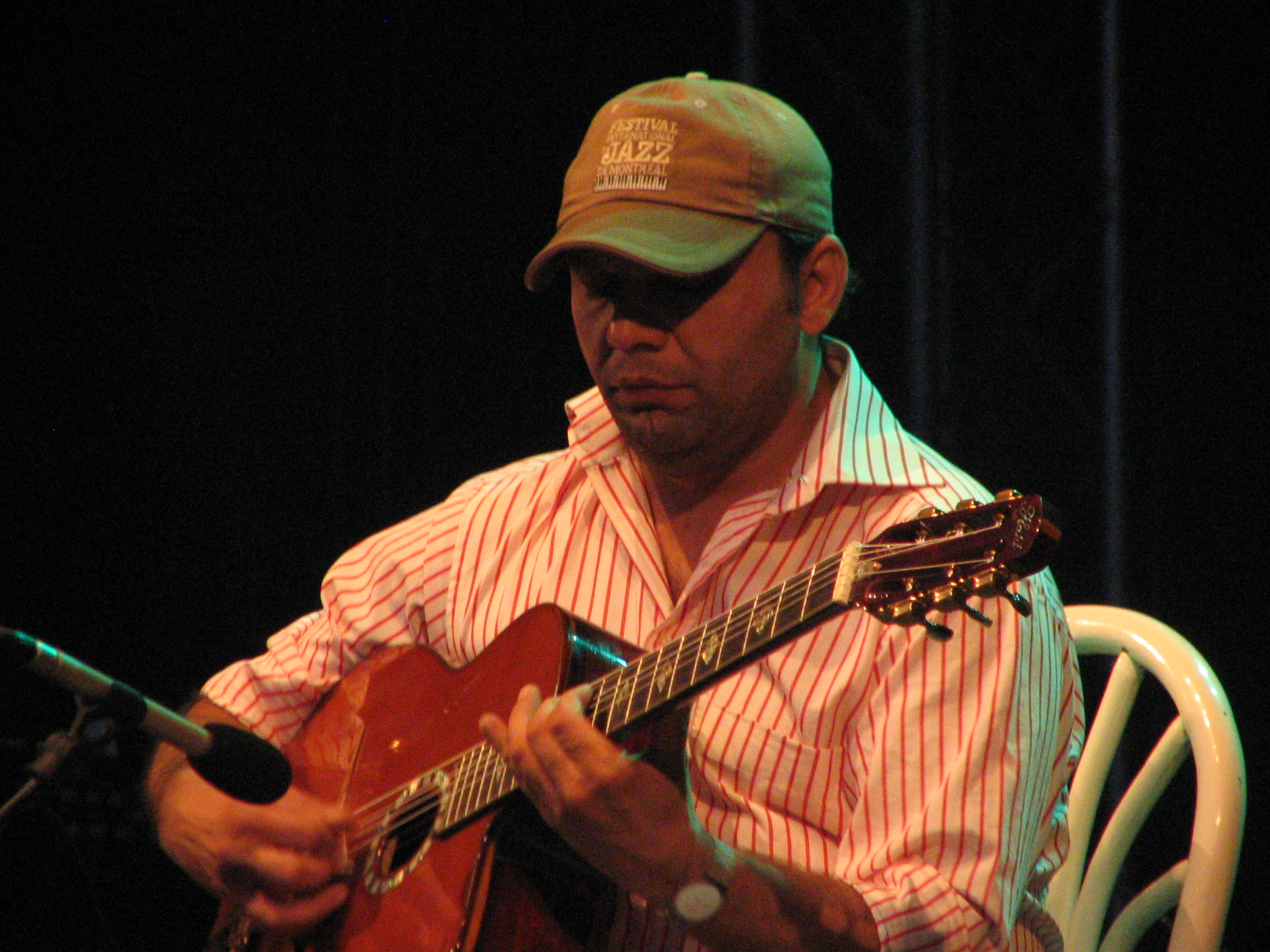 Photo personnelle de Bireli LAGRENE prise par Pastorius54 le 26/08/06 au festival LES GRANGES en Meuse.